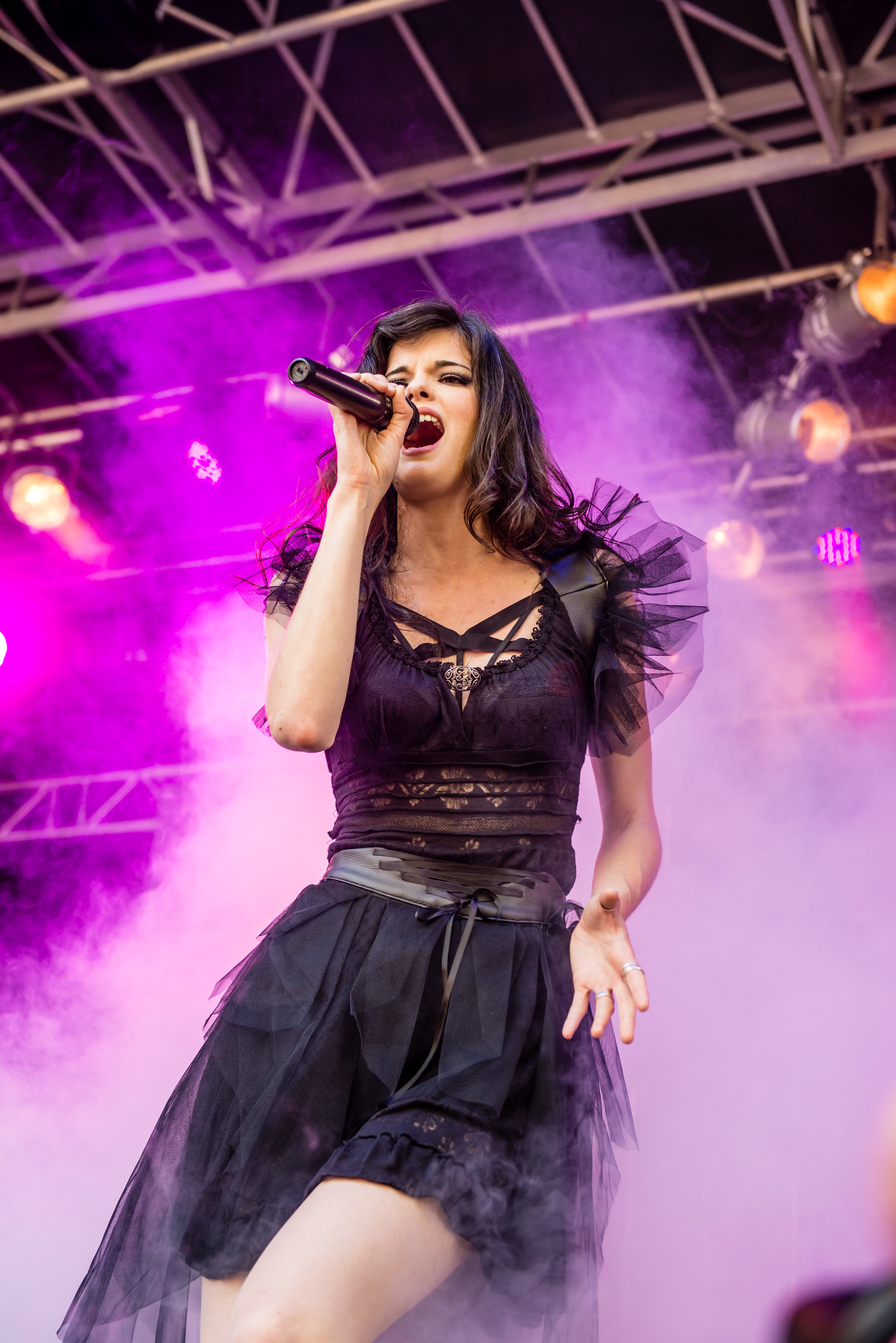 'Castle Rock 2015; Mülheim Schloß Broich': 'Visions of Atlantis'